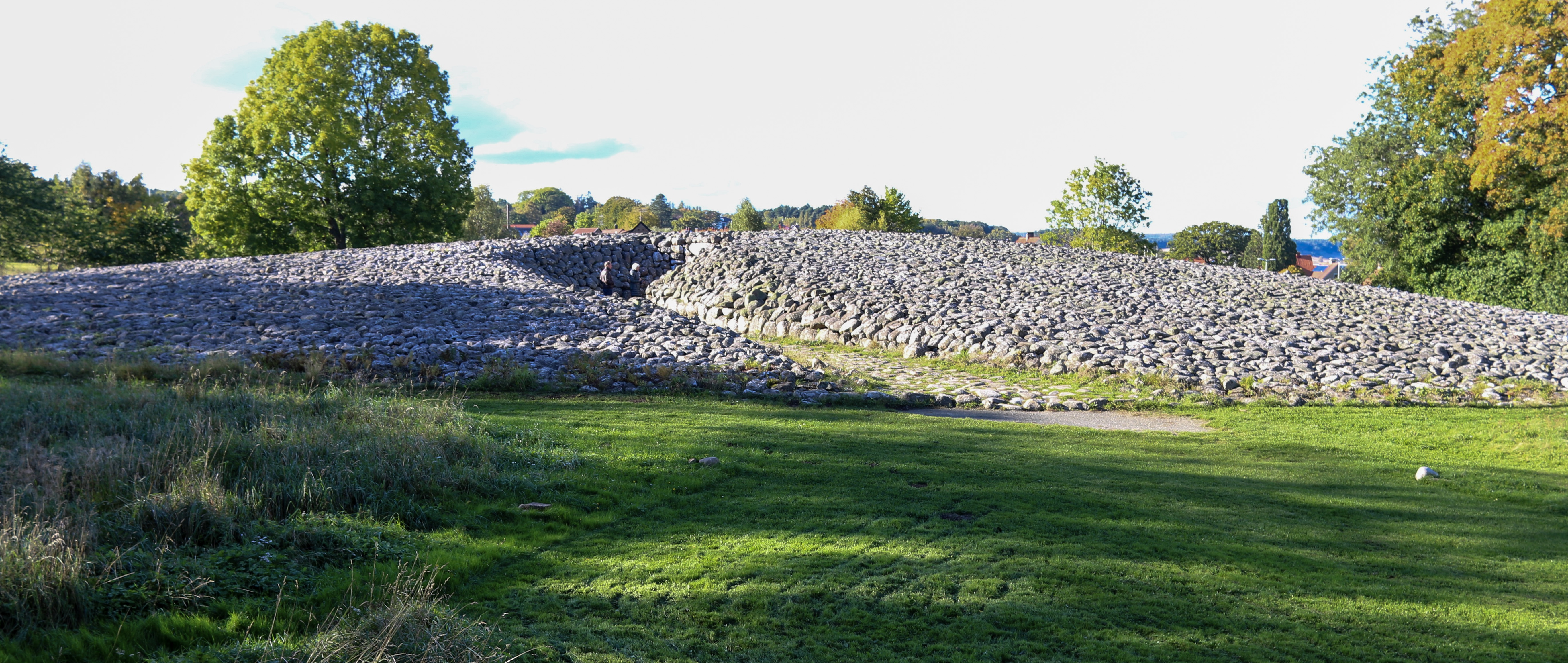 Kiviksgraven